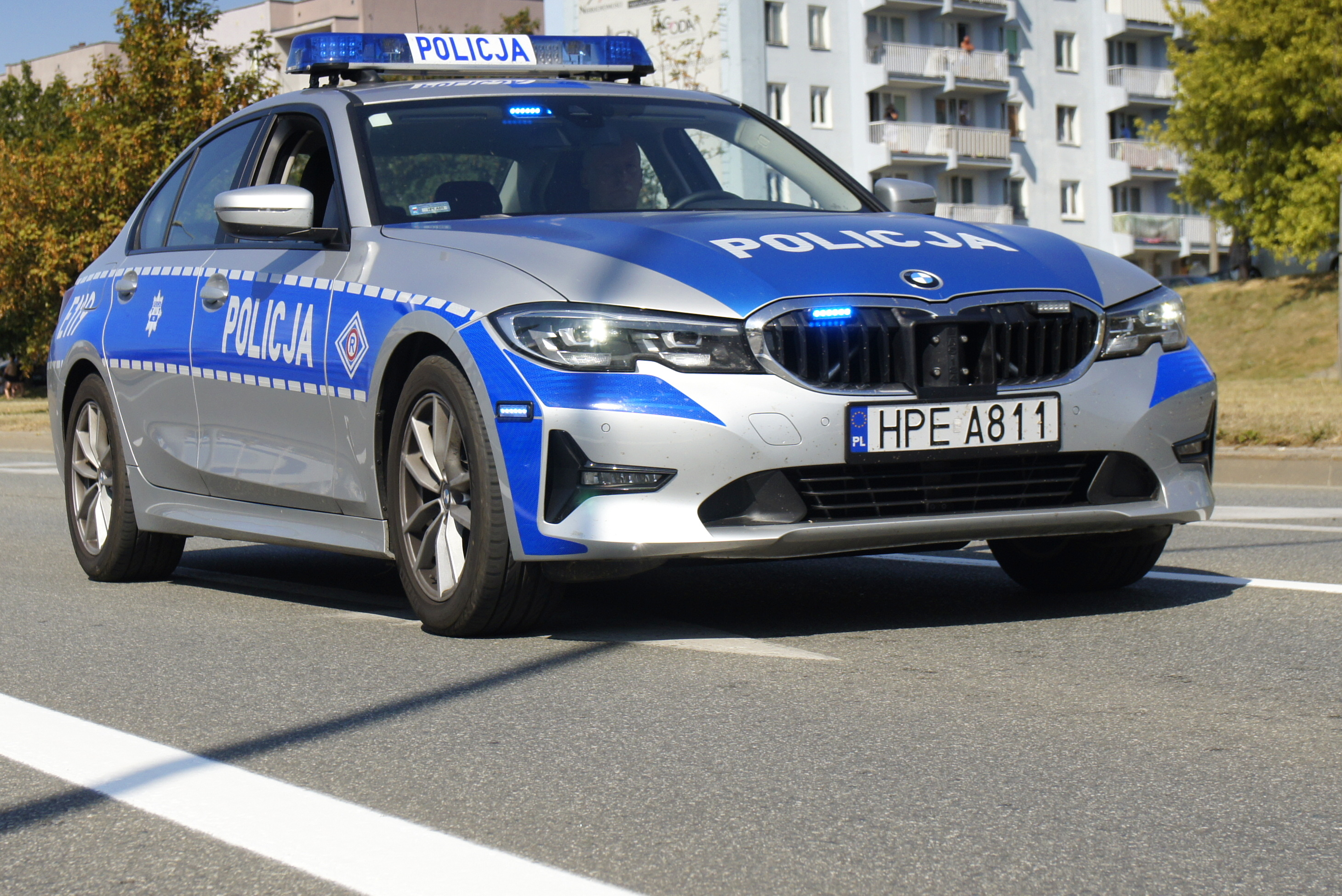 Radiowozy BMW serii 3 sedan rozpoczęły służbę w czerwcu 2019 r. Są to pierwsze w historii samochody tej marki w barwach polskiej policji. Do tej pory BMW służyły jako radiowozy nieoznakowane. Zakupiono 51 sztuk BMW serii 3 sedan jako oznakowane oraz 31 BMW serii 3 Gran Turismo które będą radiowozami nieoznakowanymi